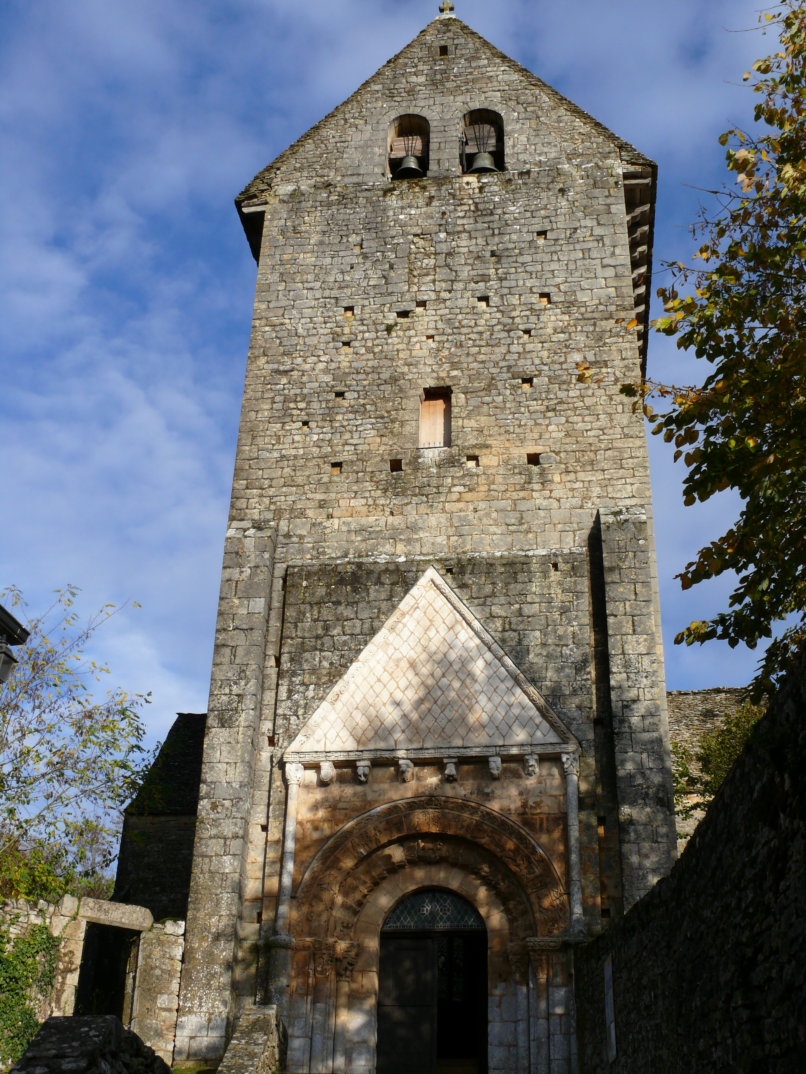 Besse - Eglise Saint-Martin - Façade occidentale et portail